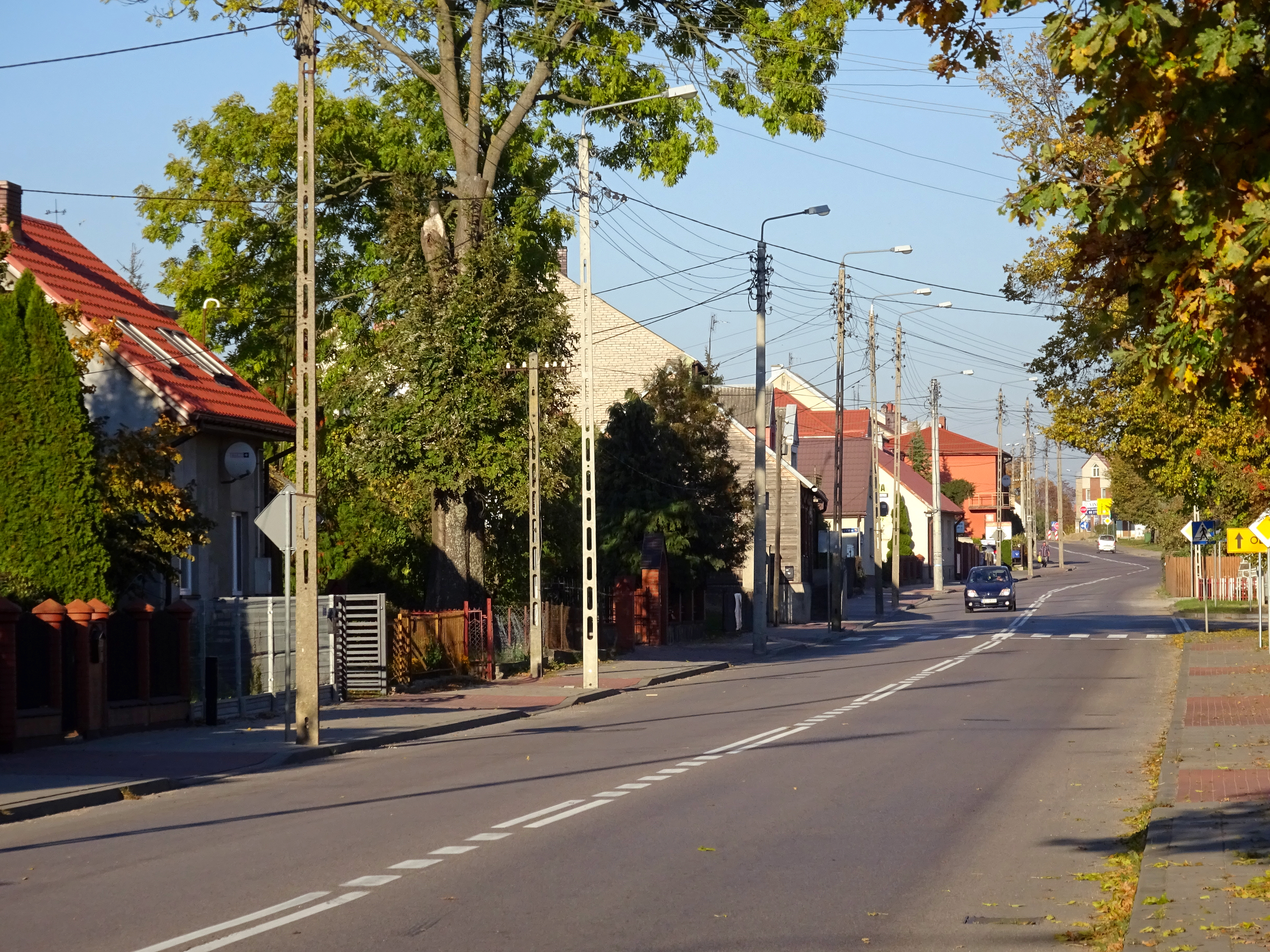 Kolno - ul. Mickiewicza i Sienkiewicza (dalszy odcinek).